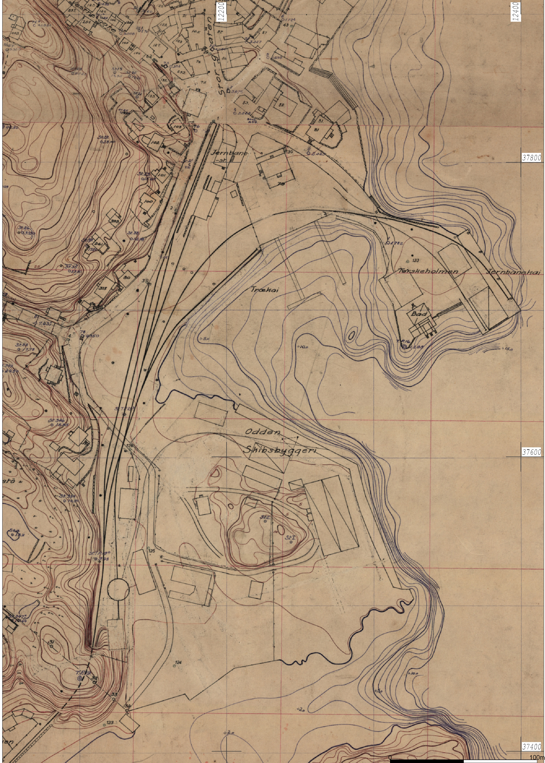 Området ved jernbanestasjonen i Grimstad - 1920